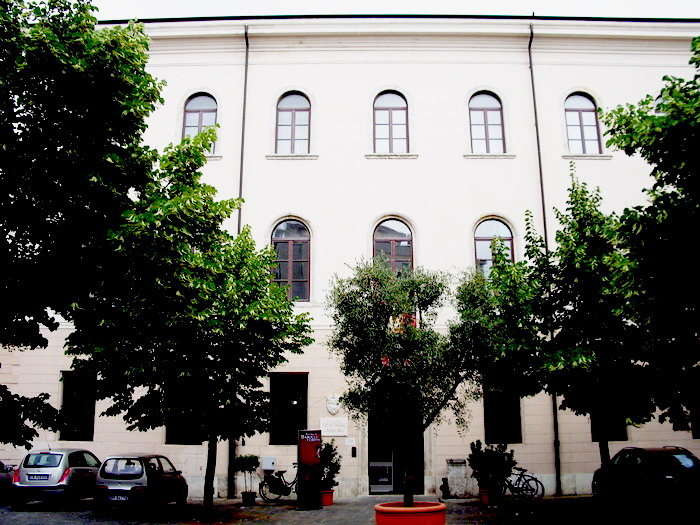 Facciata principale del Museo Archeologico e d'Arte della Maremma a Grosseto, Tuscany (Italy)